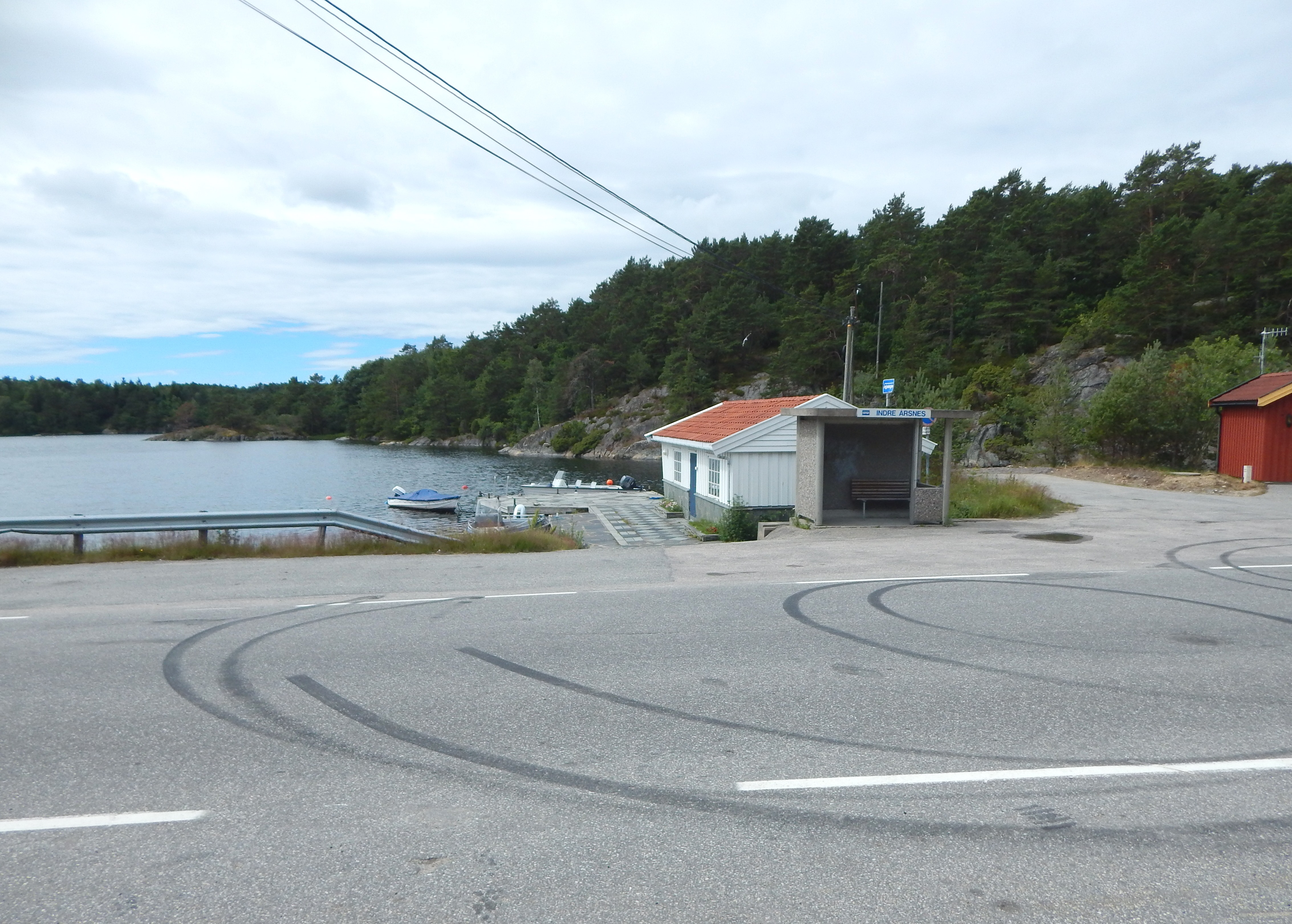 Fylkesvei 221 ved Indre Årsnes, nær krysset med primær fylkesvei 401